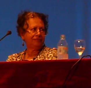 Silvia Arango Cardinal, arquitecta